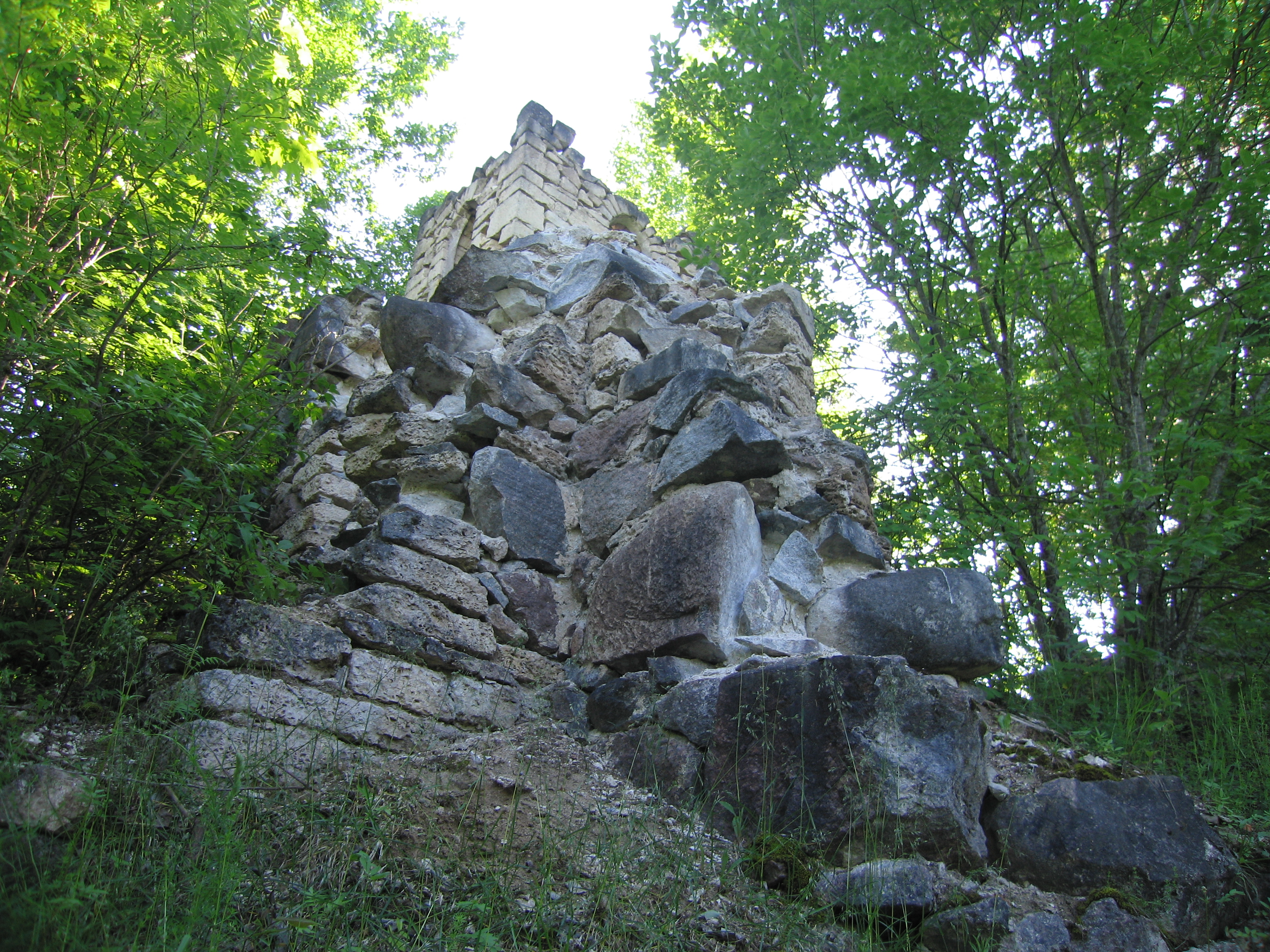 Kalmistu kabeli lõunakülg.Foto: Robert Treufeldt, 21. juuni 2015